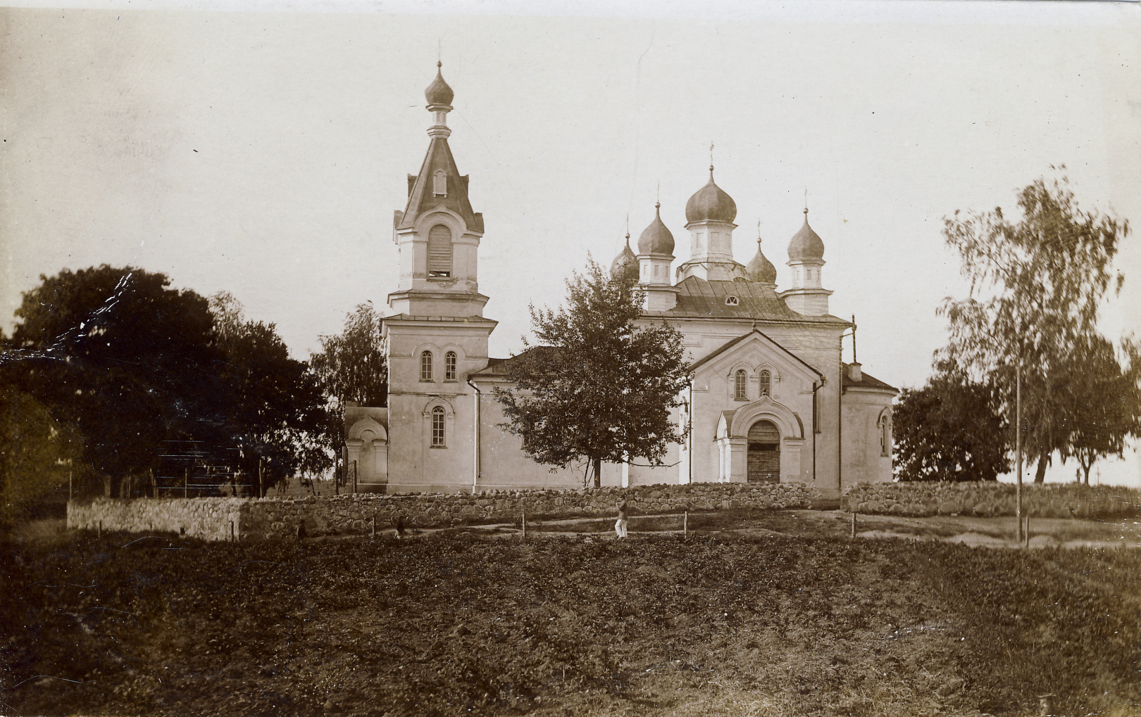 Беларуская (тарашкевіца): Моўчадзь (Moŭčadź), вуліца Калесьніцкая (vulica Kaleśnickaja). Петрапаўлаўская царква-мураўёўка